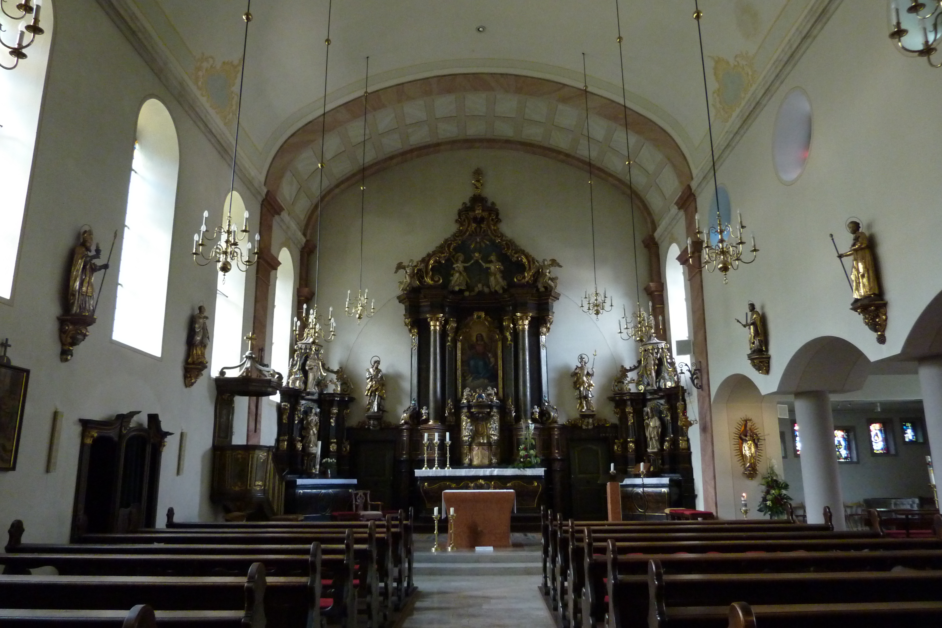 Innenansicht der katholischen Kirche St. Johannes Apostel in Dernau